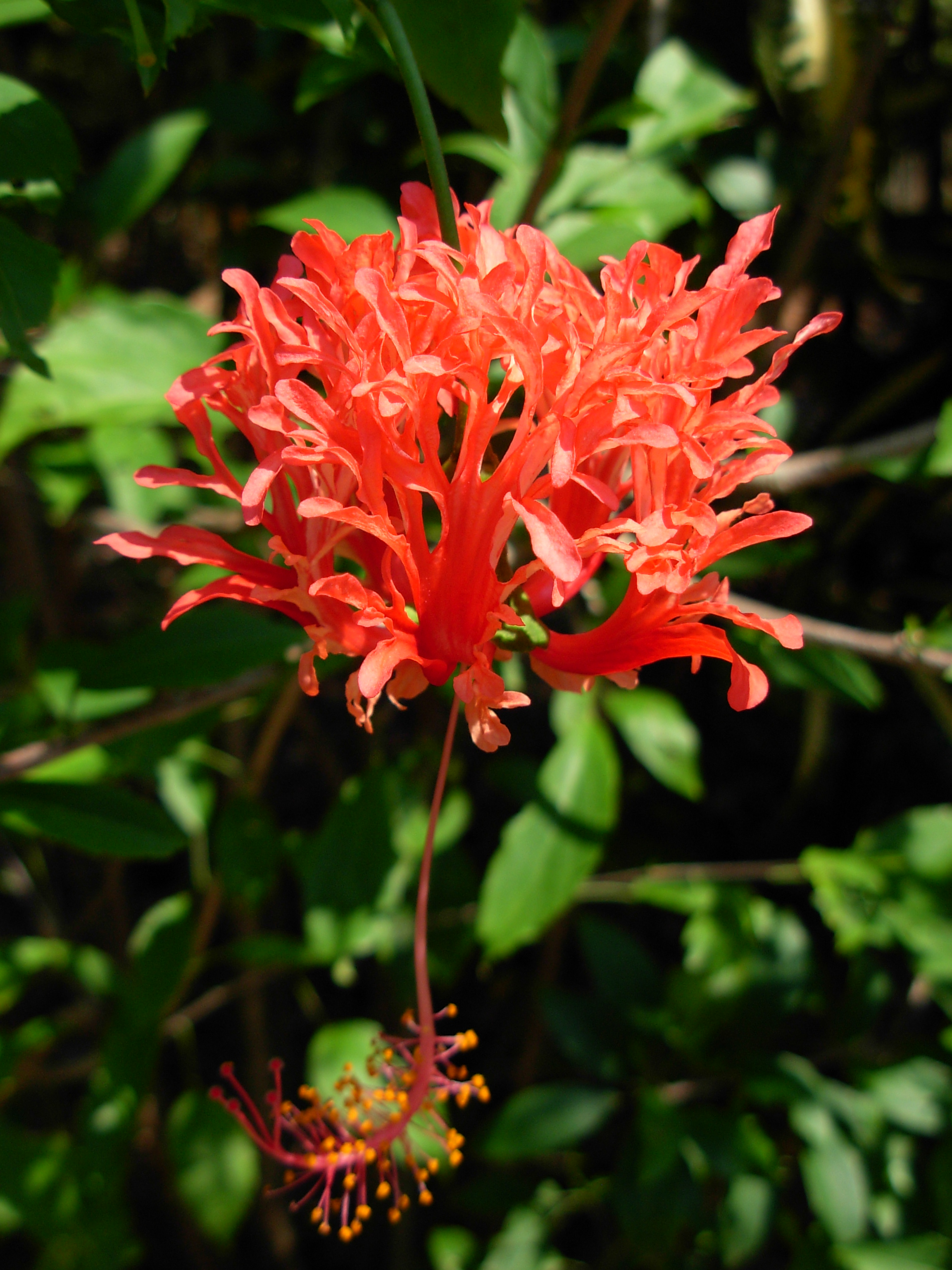 ചെമ്പരത്തി